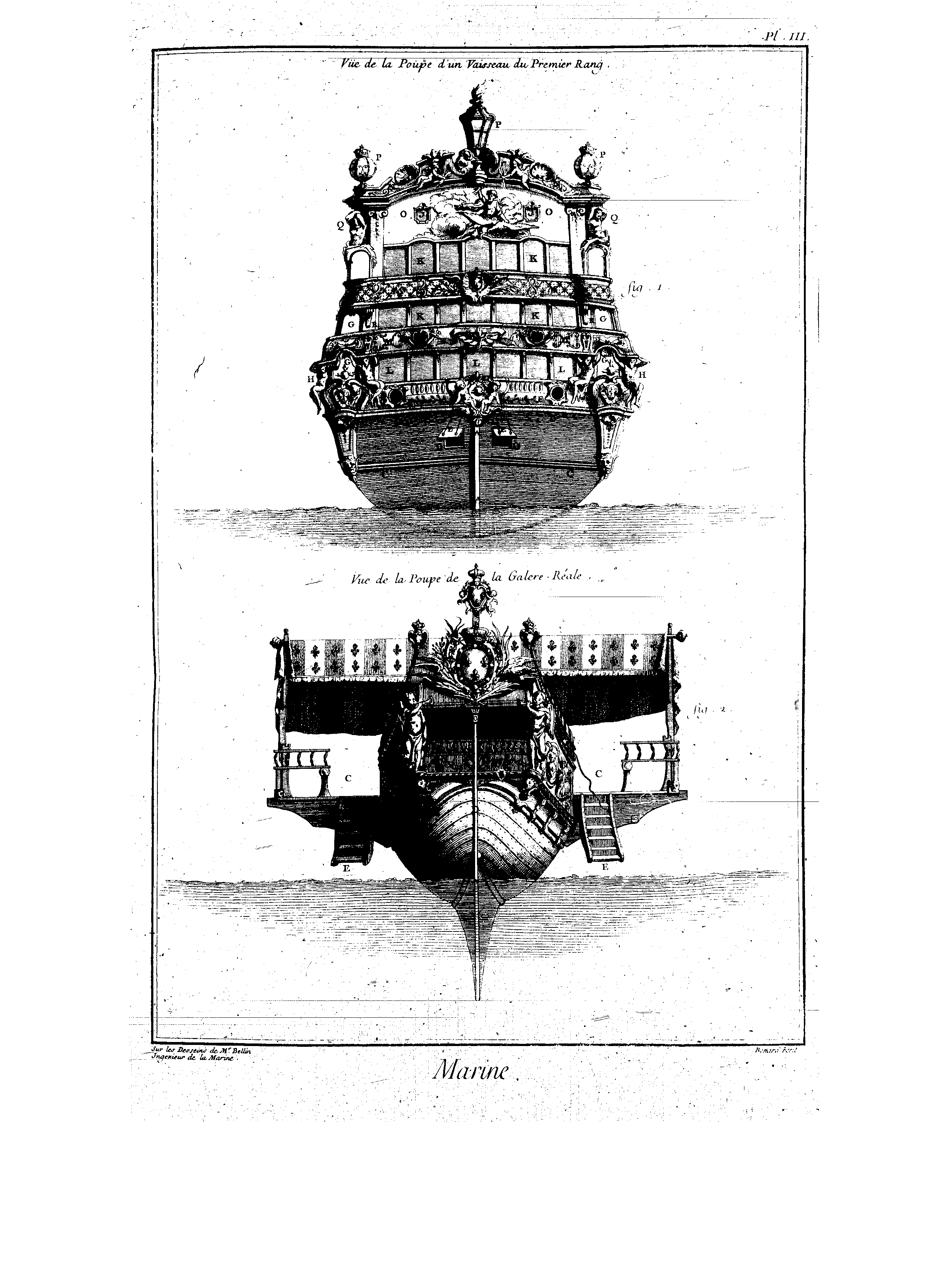 Planches de l'Encyclopédie de Diderot et d'Alembert, volume 6